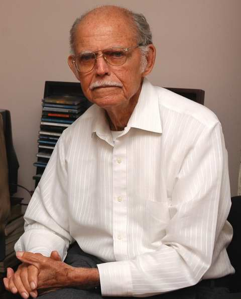 El Comandante Huber Matos Benitez